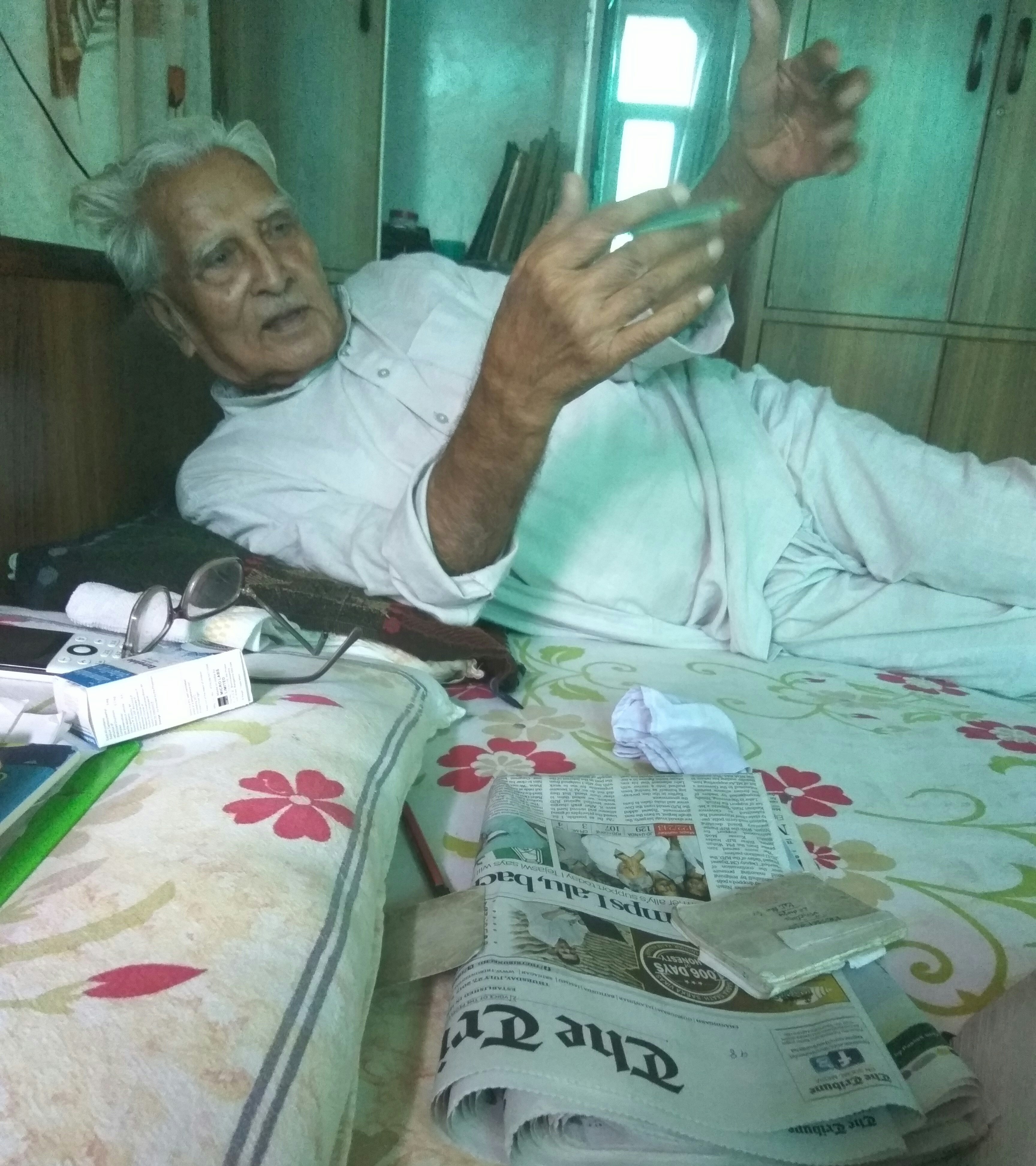 Chandler parkash rahi is a Punjabi writer at Patiala.